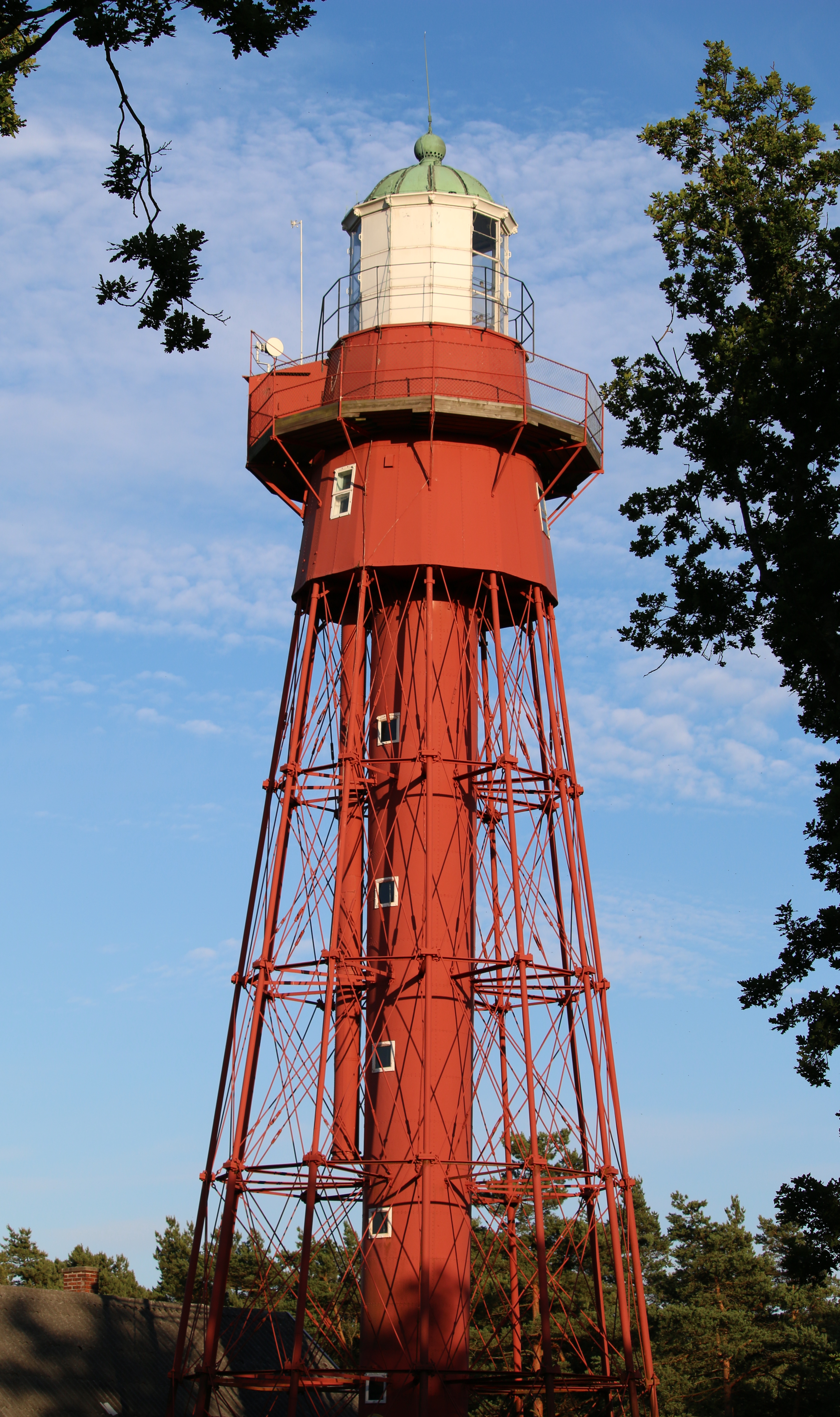 Sandhammarens fyr